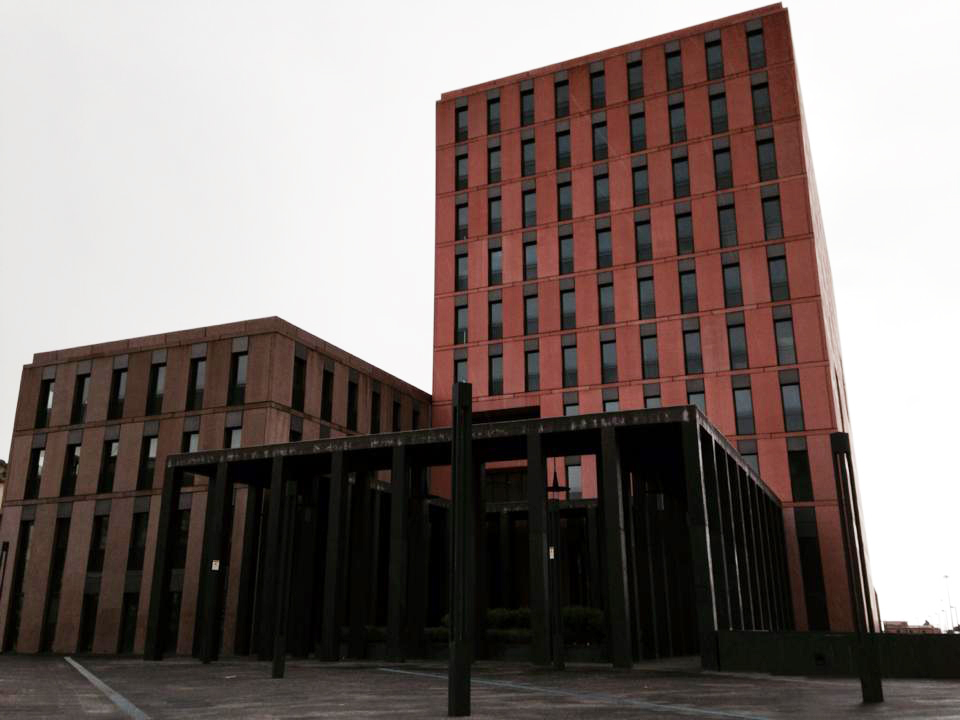 Esterno della cittadella giudiziaria, da piazza Dalmazia